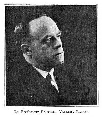 Le Professeur Pasteur Vallery-Radot - Paris médical : la semaine du clinicien, 1940, n° 116_118